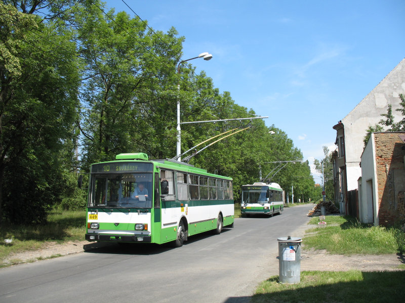 Plzeňský trolejbus Škoda 14Tr č. 449 a vůz Škoda 21TrACI